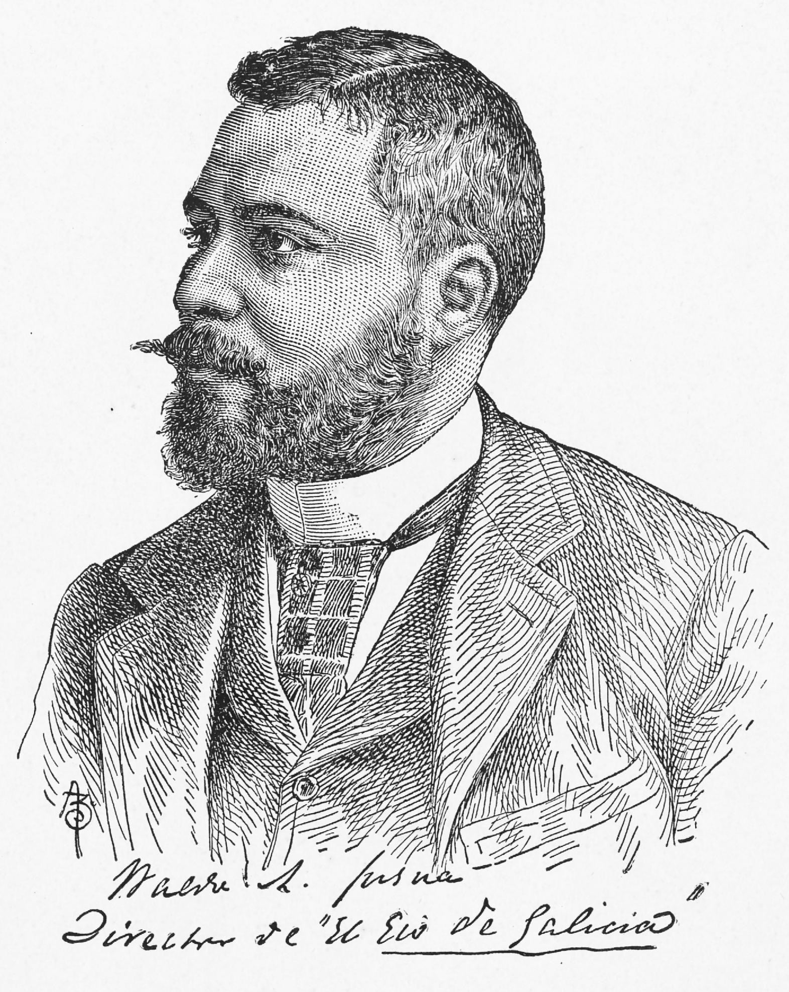 "Waldo Álvarez Ínsua. Director de El Eco de Galicia" in Galicia contemporánea (páginas de viaje)